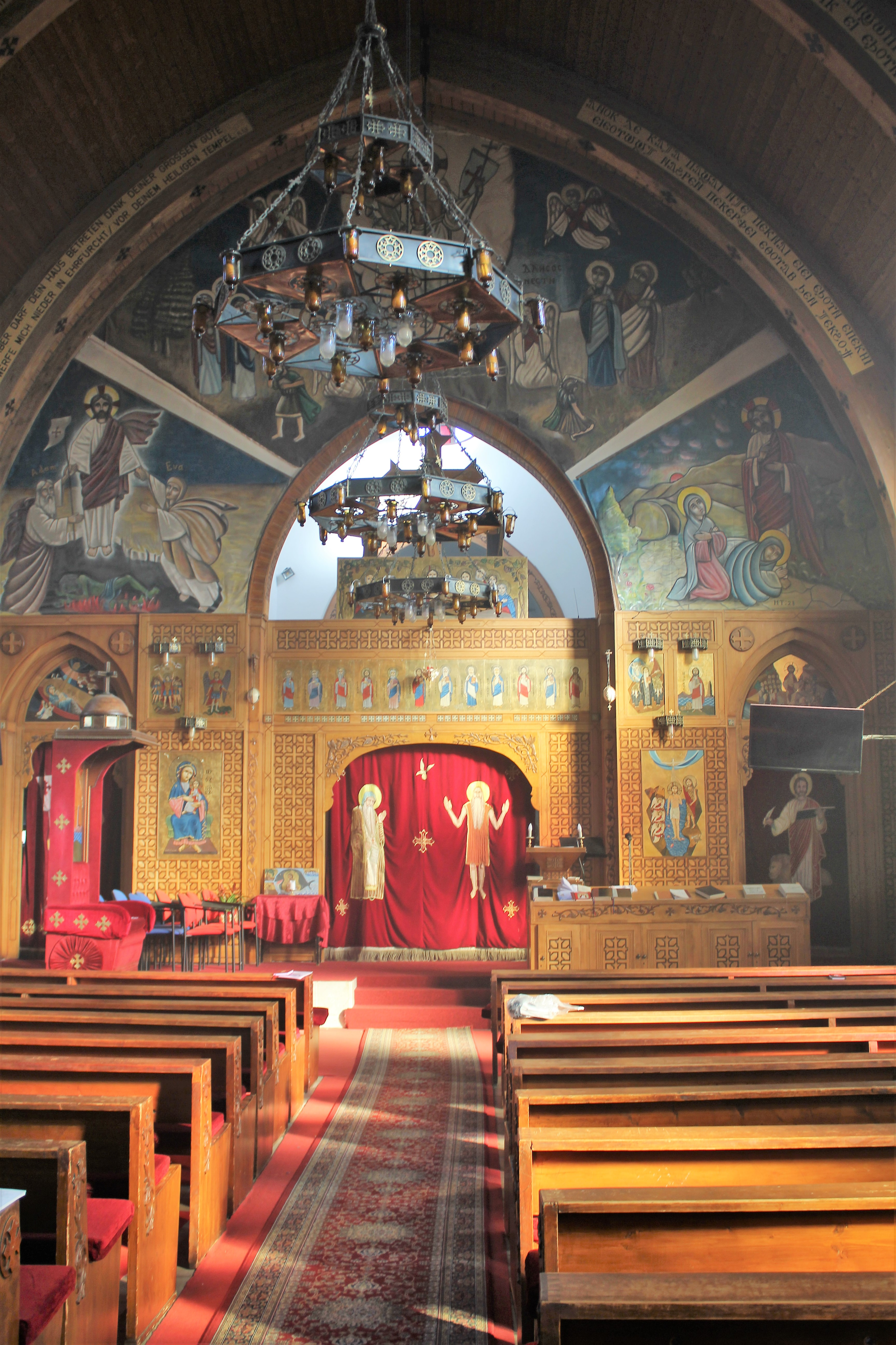 Koptisch-orthodoxes Kloster Ktröffelbach, Waldsolms, Lahn-Dill-Kreis, Hessen, Deutschland